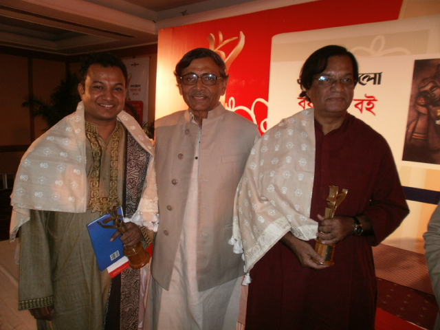 ১৪১৬ বঙ্গাব্দের দুই পুরস্কার বিজয়ী পাশে নিযে প্রধান বিচারক অধ্যাপক আব্দুল্লাহ আবু সায়ীদ